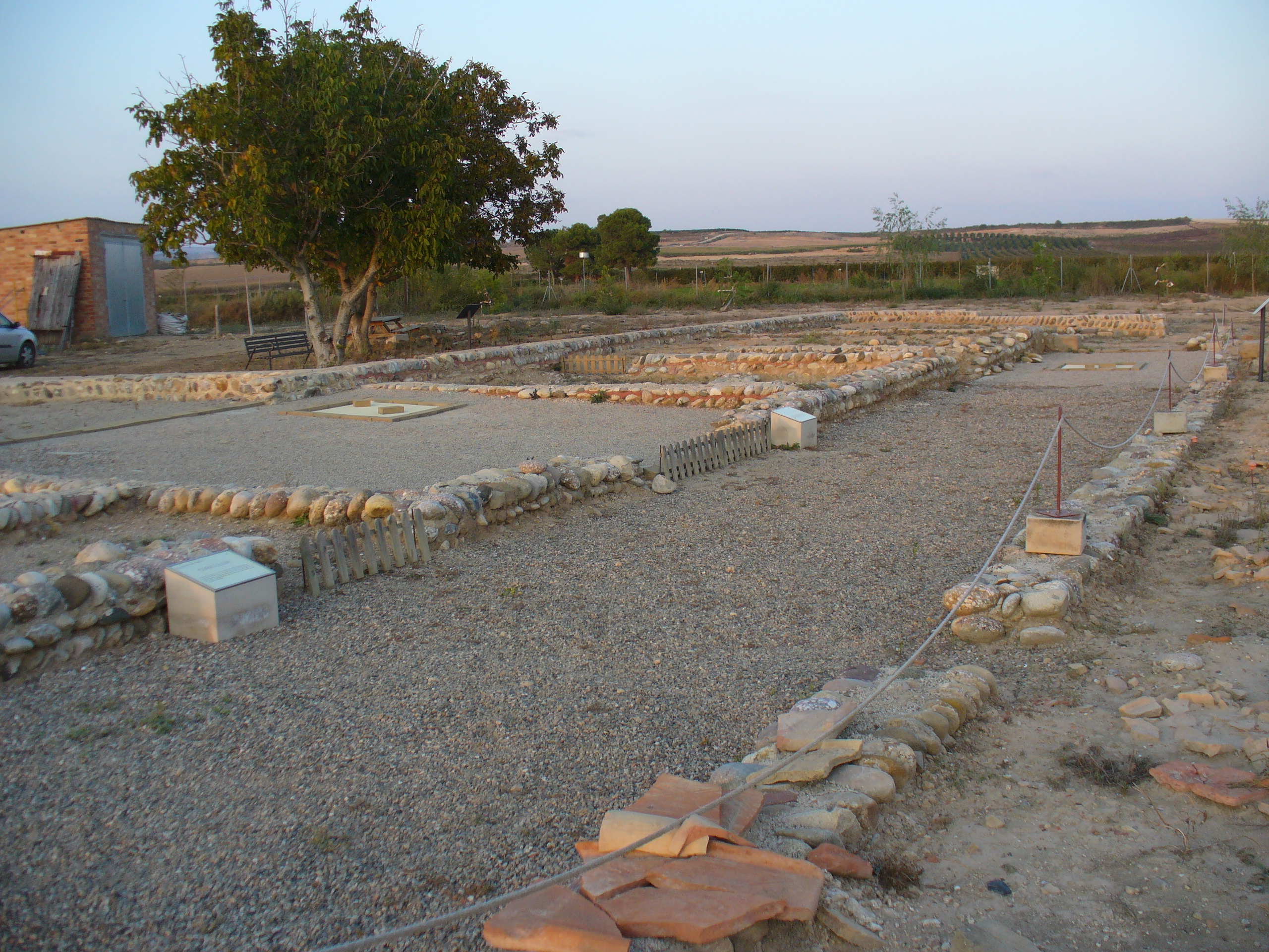 Passadís central de la vil·la romana del Romeral d'Albesa (la Noguera). Les restes daten del segle II aC.